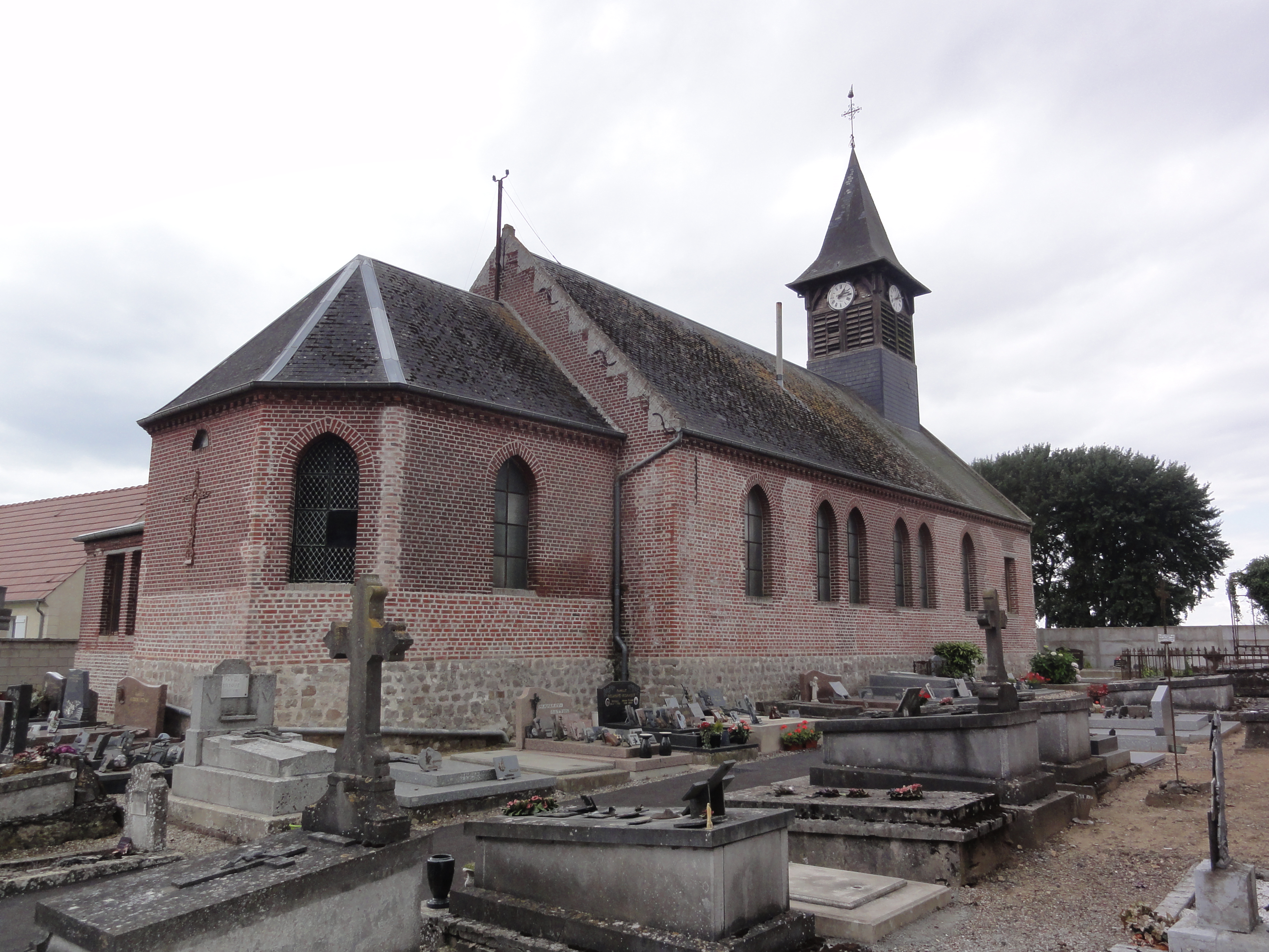 Beaumont-en-Beine (Aisne) église de la Nativité-de-la-Sainte-Vierge